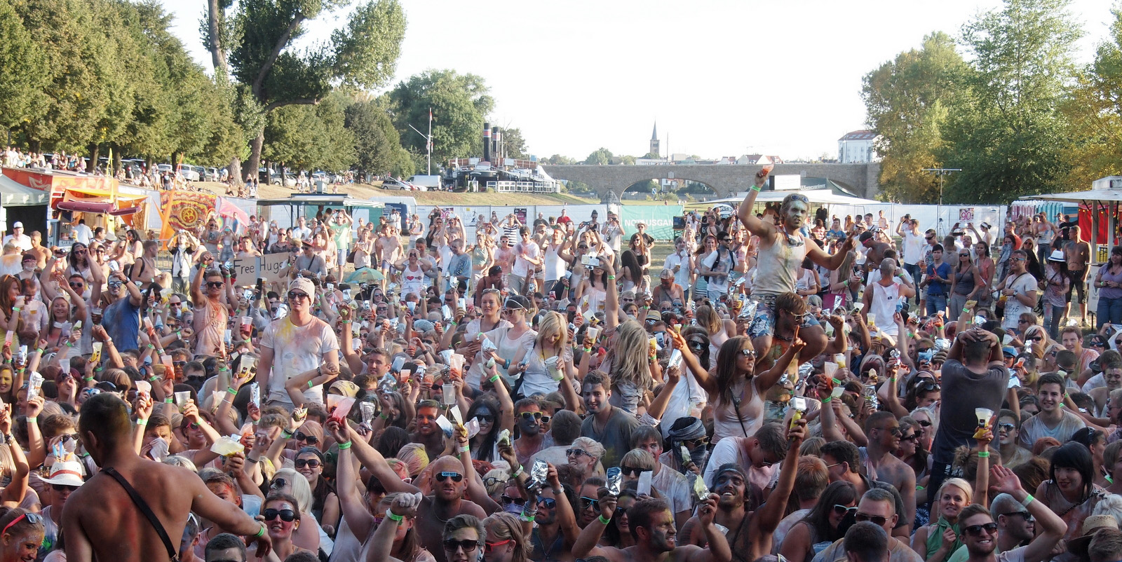 Magdeburg, Holi Party, Fest der Farben, Elbwiesen, Sternbruecke, Hubbrucke, Sachsen Anhalt Holi festival in Germany